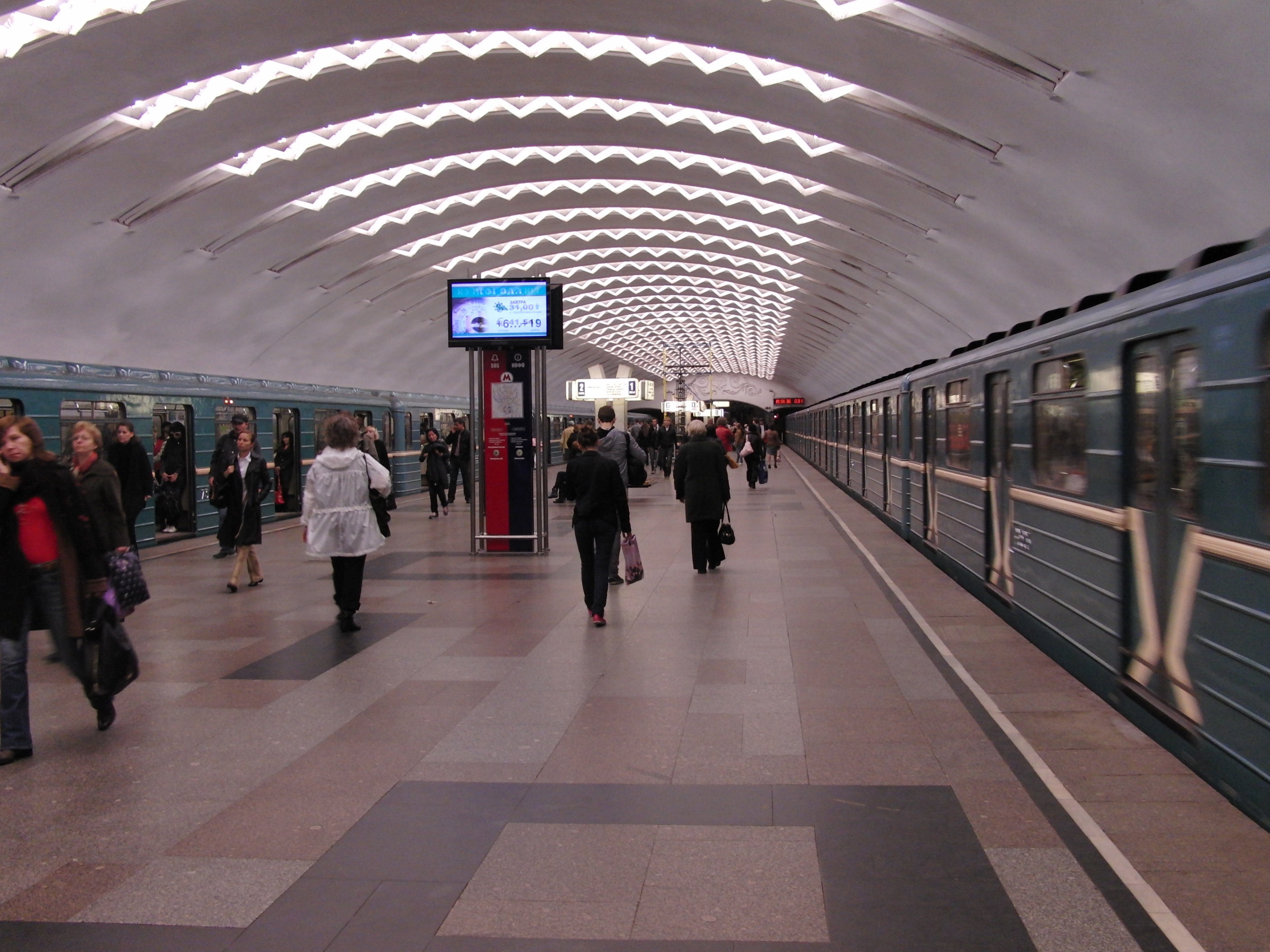 Perovo (Перово)